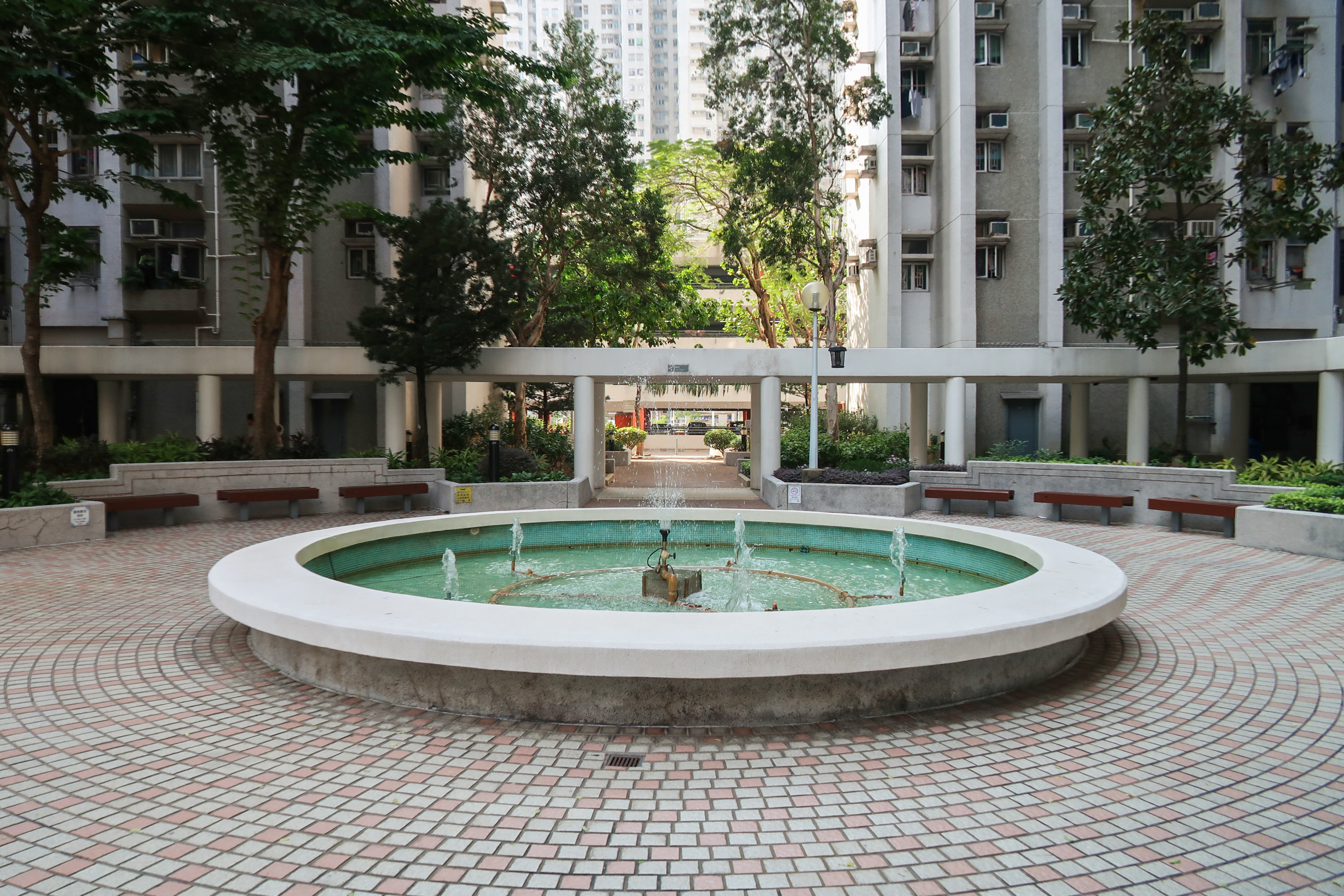 Siu Lun Court Fountain